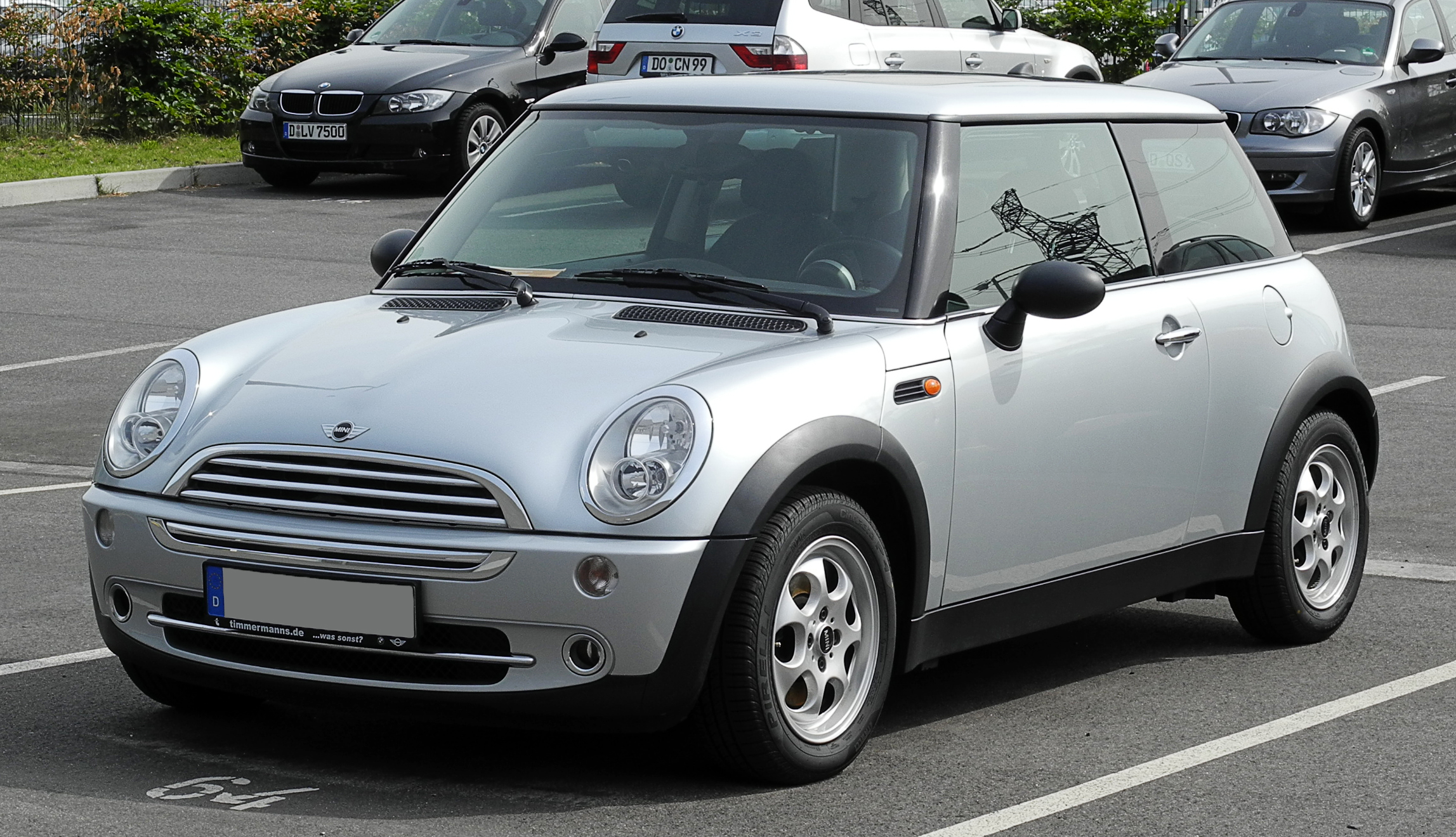 Mini One (R50)